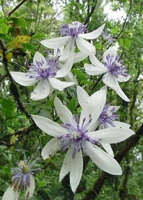 Clematis akoensis Hayata